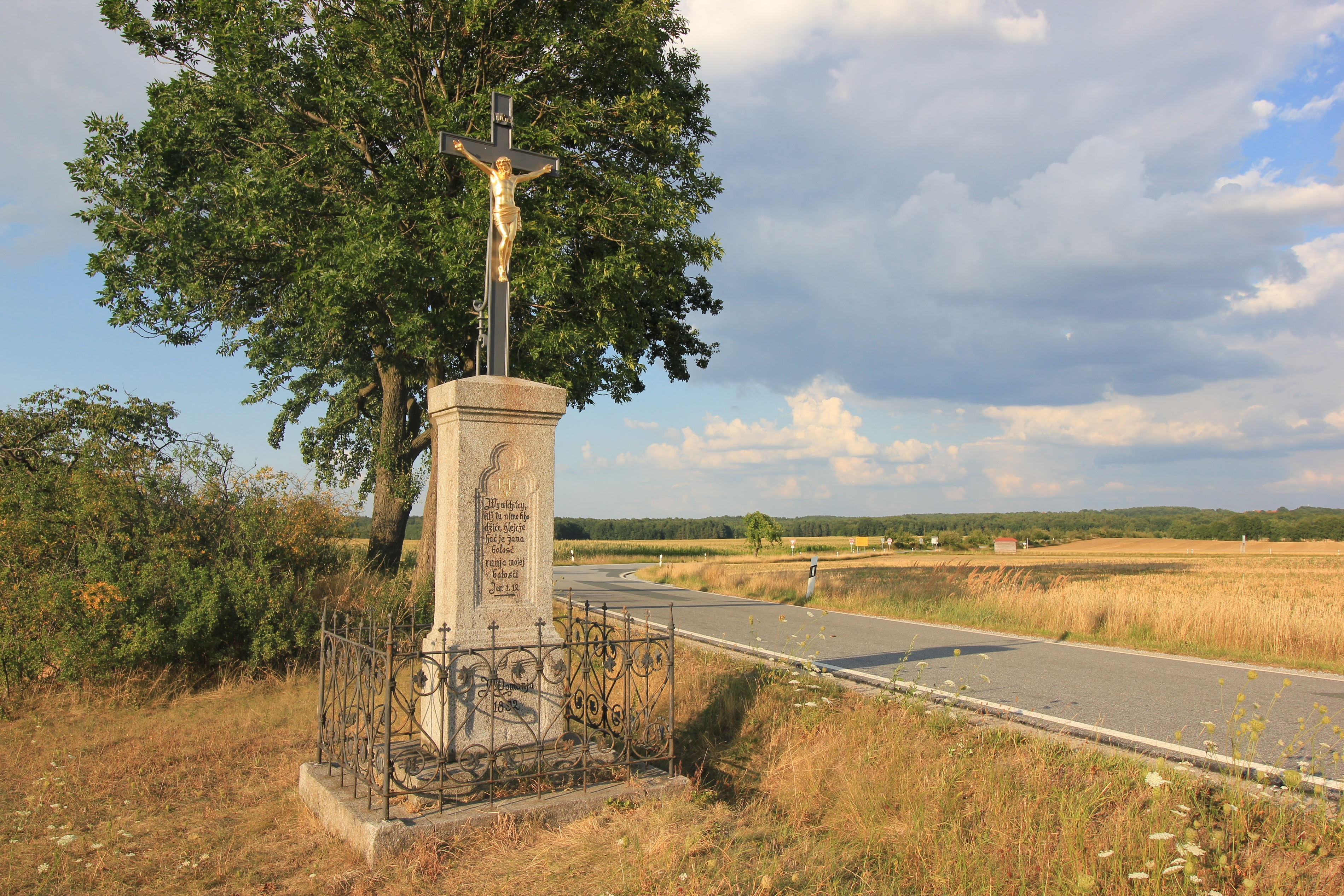 Hornjoserbsce: Swjaty křiž sewjernje Kamjeneje, napis: "Wy wšitcy, kiž tu nimo chodźiće, hlejće hač je žana bolosć runja mojej bolosći. Jer 1.12 – J. Domanja 1892"